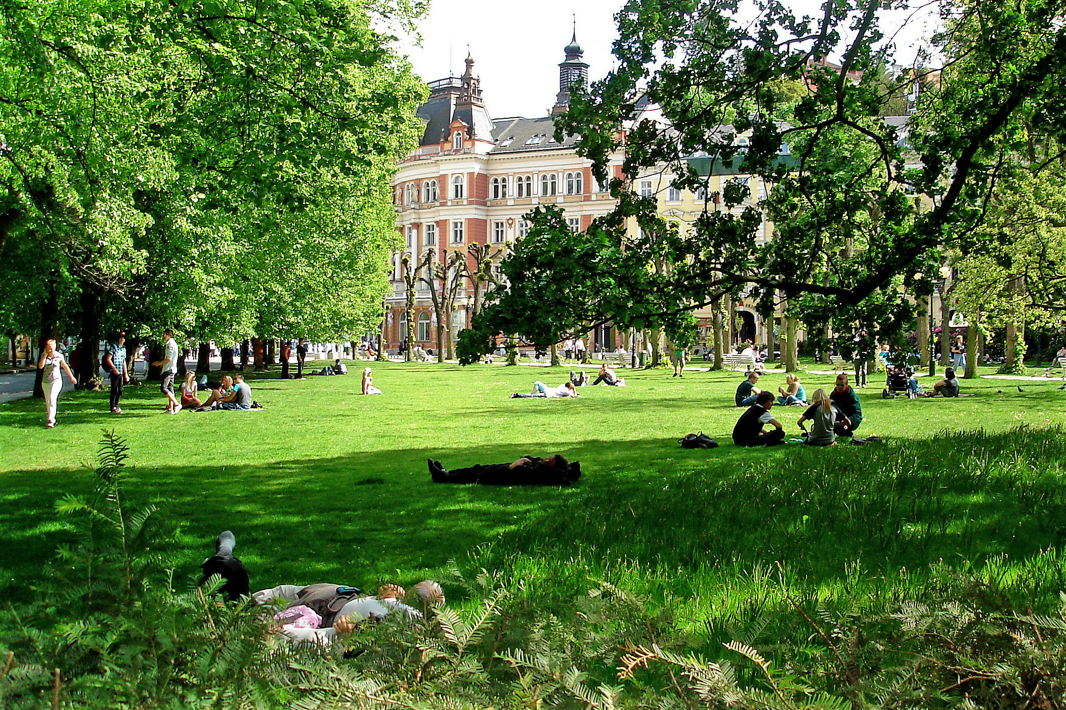 Карловы Вары